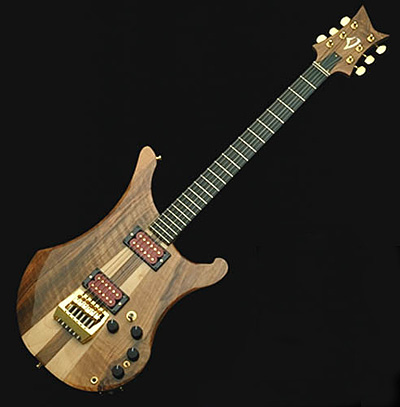 Guitare Vigier Arpege.